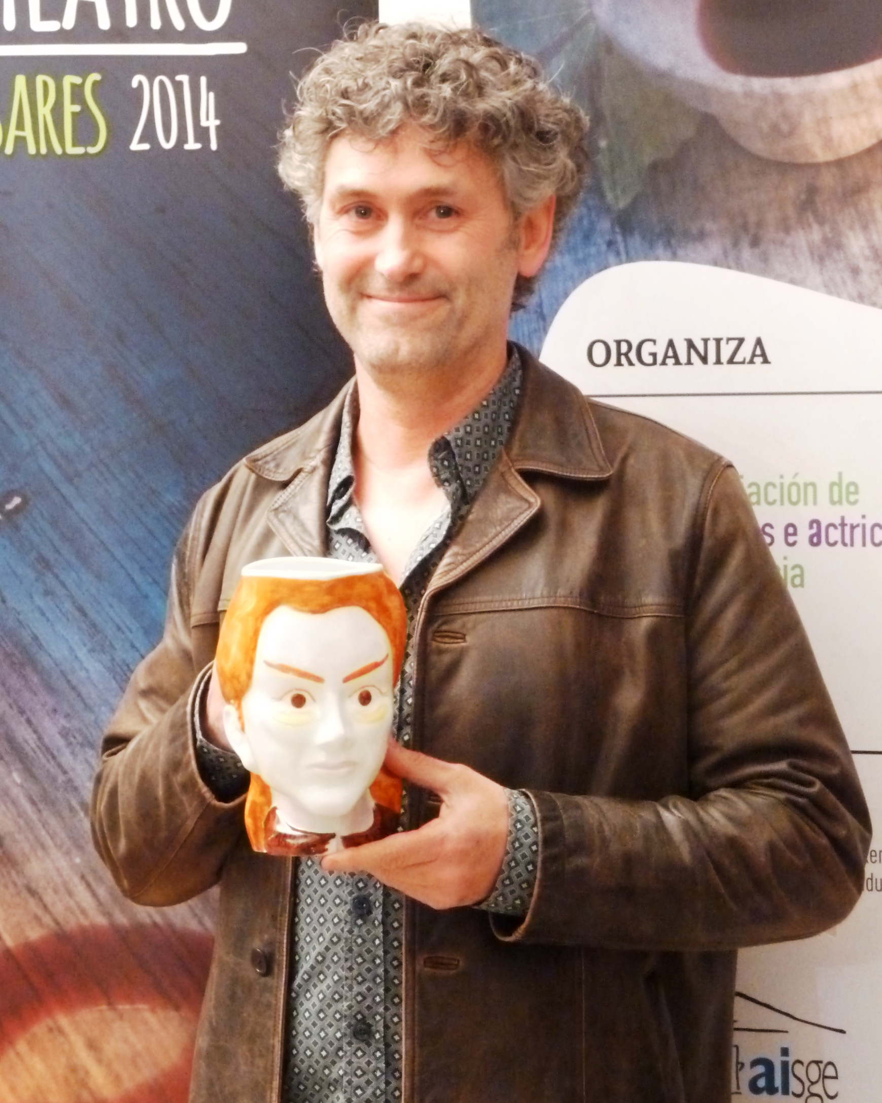 Cándido Pazó na gala dos premios María Casares 2014.